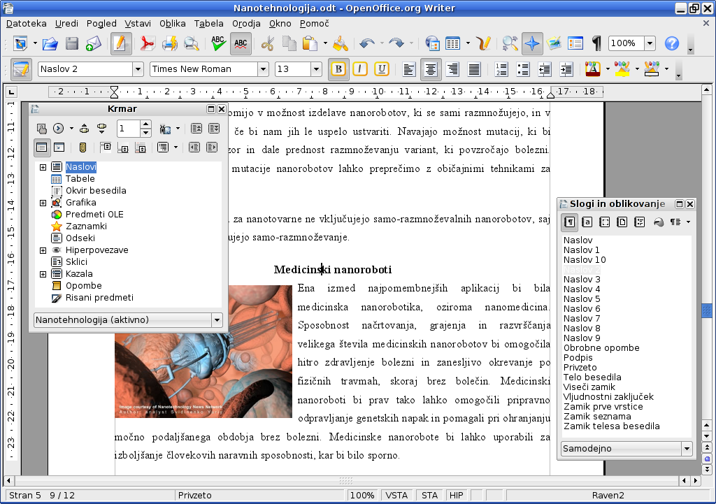 Zaslonski posnetek dela z Writer.